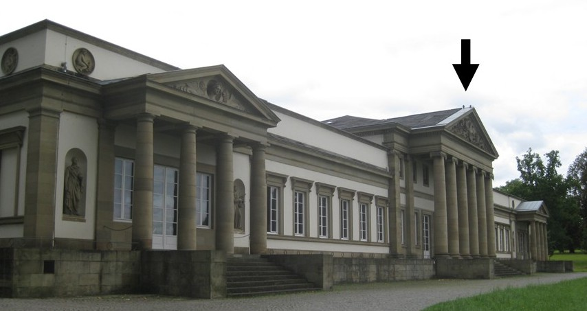 Stuttgart, Schloss Rosenstein, Nordostfassade. Der Pfeil zeigt auf das Giebelfeld des Hauptportikus